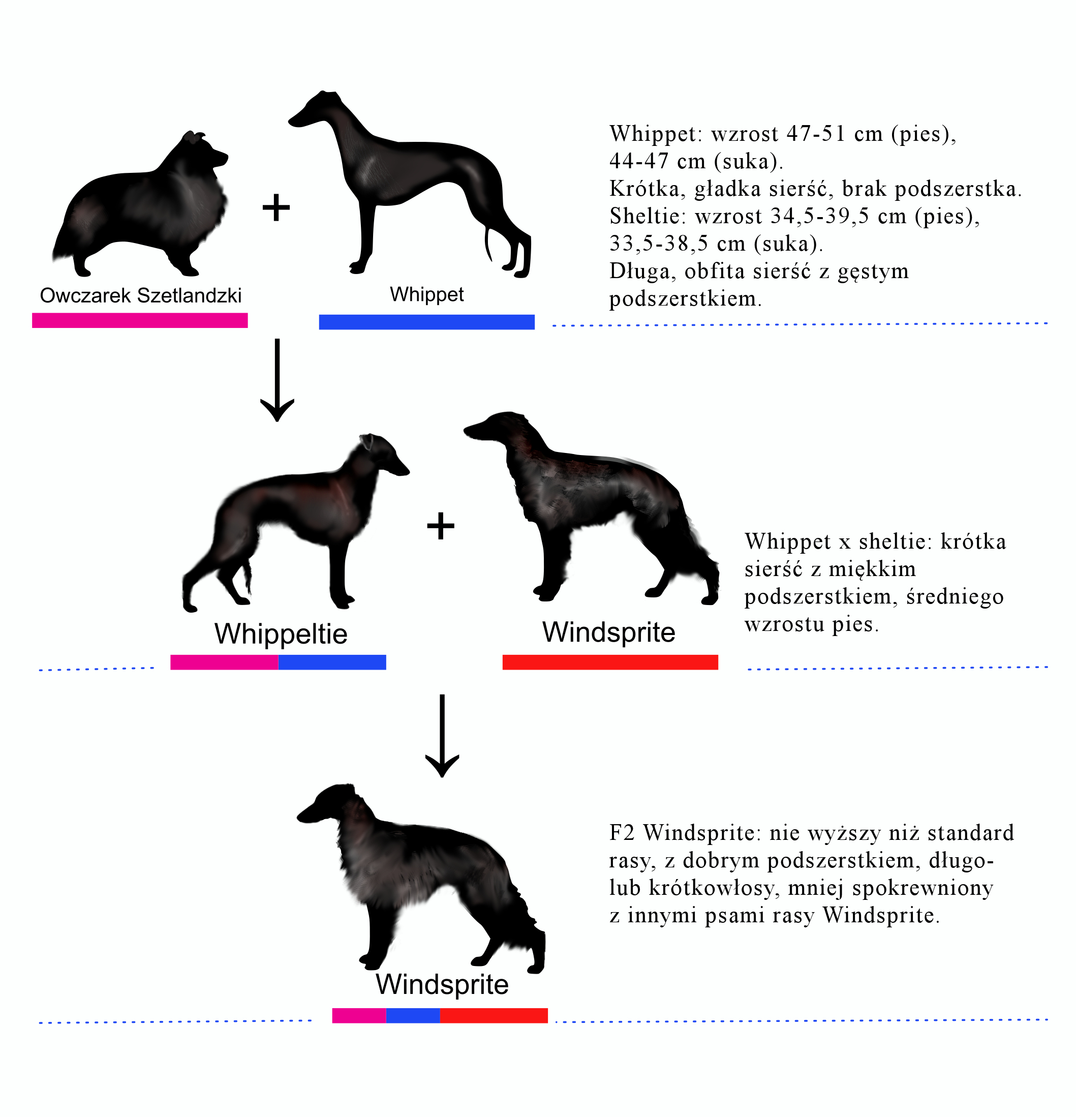 Przykład celowego łączenia ras w celu zwiększenia różnorodności genetycznej w rzadkiej rasie, zachowując pożądany typ i cechy charakterystyczne.